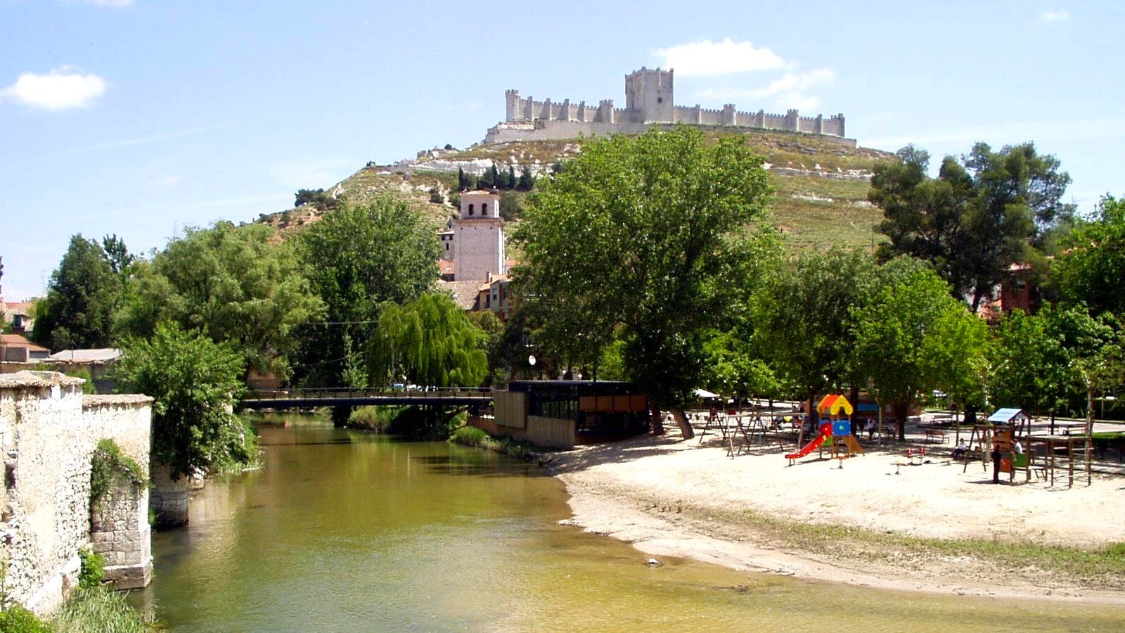 Peñafiel. Judería. Río Duratón. Castillo de Peñafiel. Museo del Vino. Ribera de Duero. Campo de Peñafiel. Valladolid